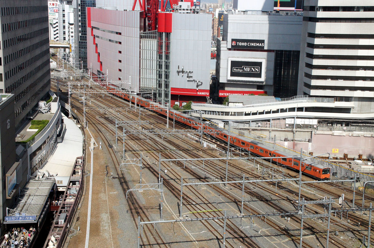 大阪駅を発車した大阪環状線の列車